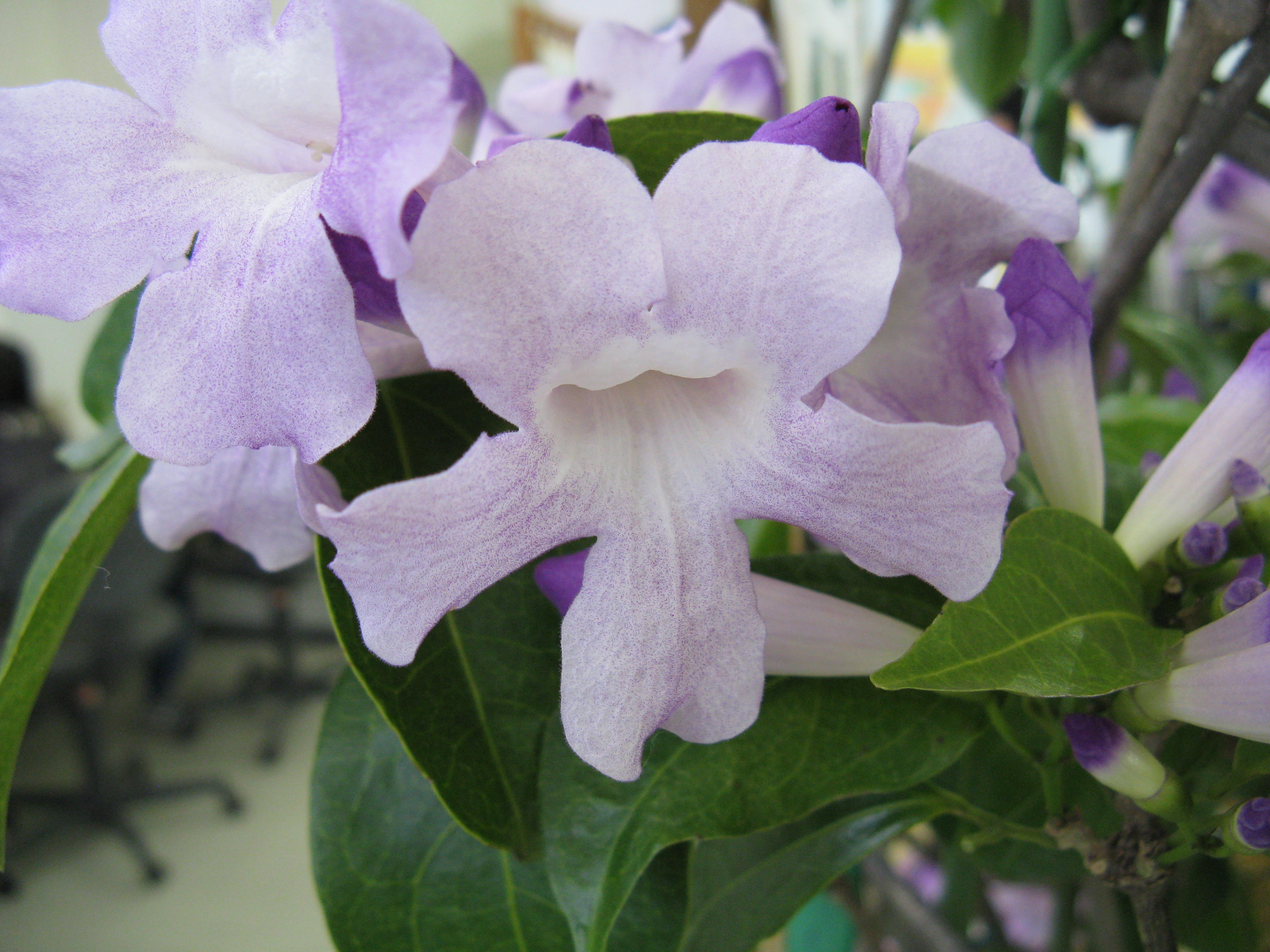 Scientific name Mansoa alliacea Place:Sakuya Konohana Kan,Osaka,Japan